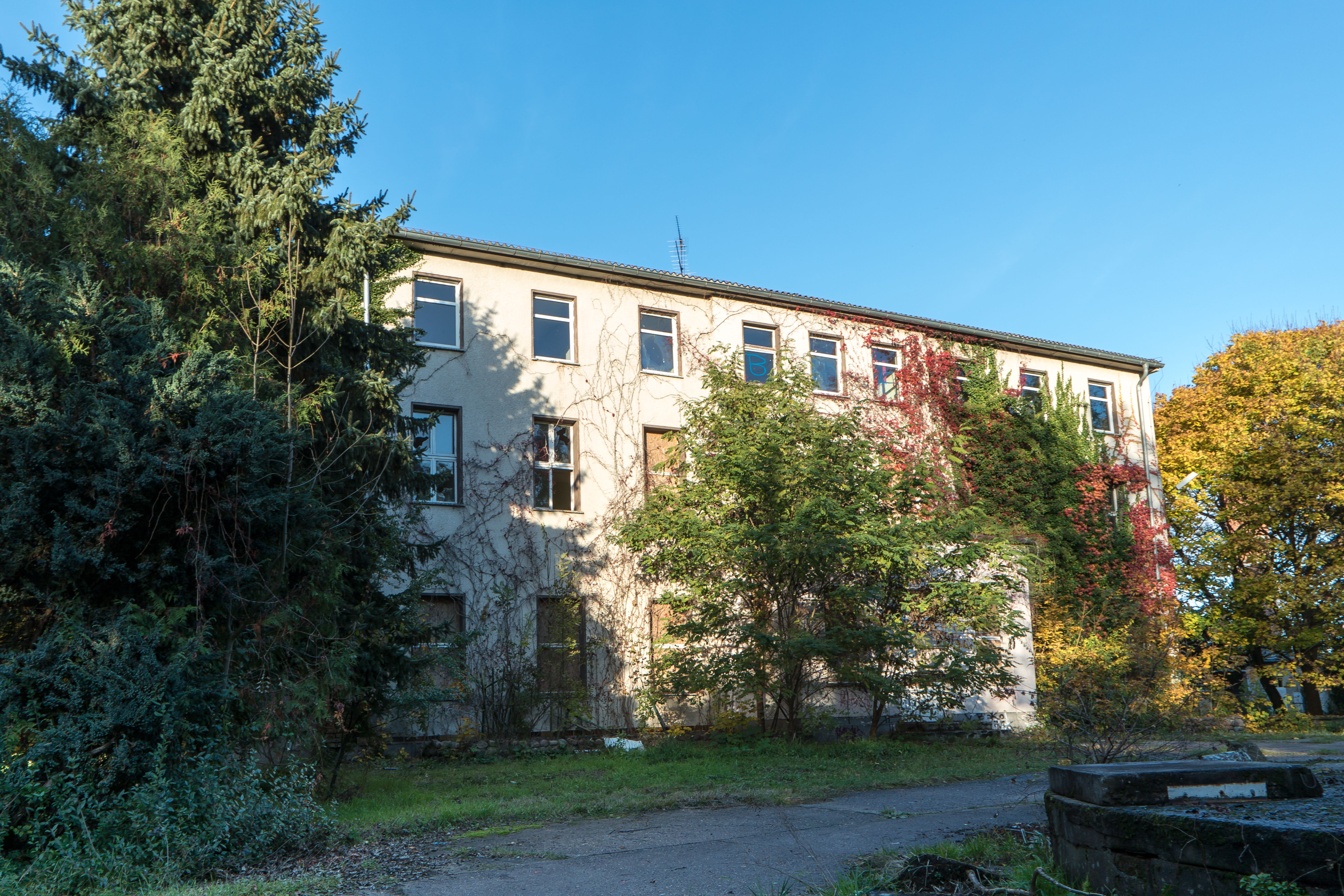 Ehemaliges Herrenhaus (Gutshaus Borstel) in Großschwarzlosen (Südseite)